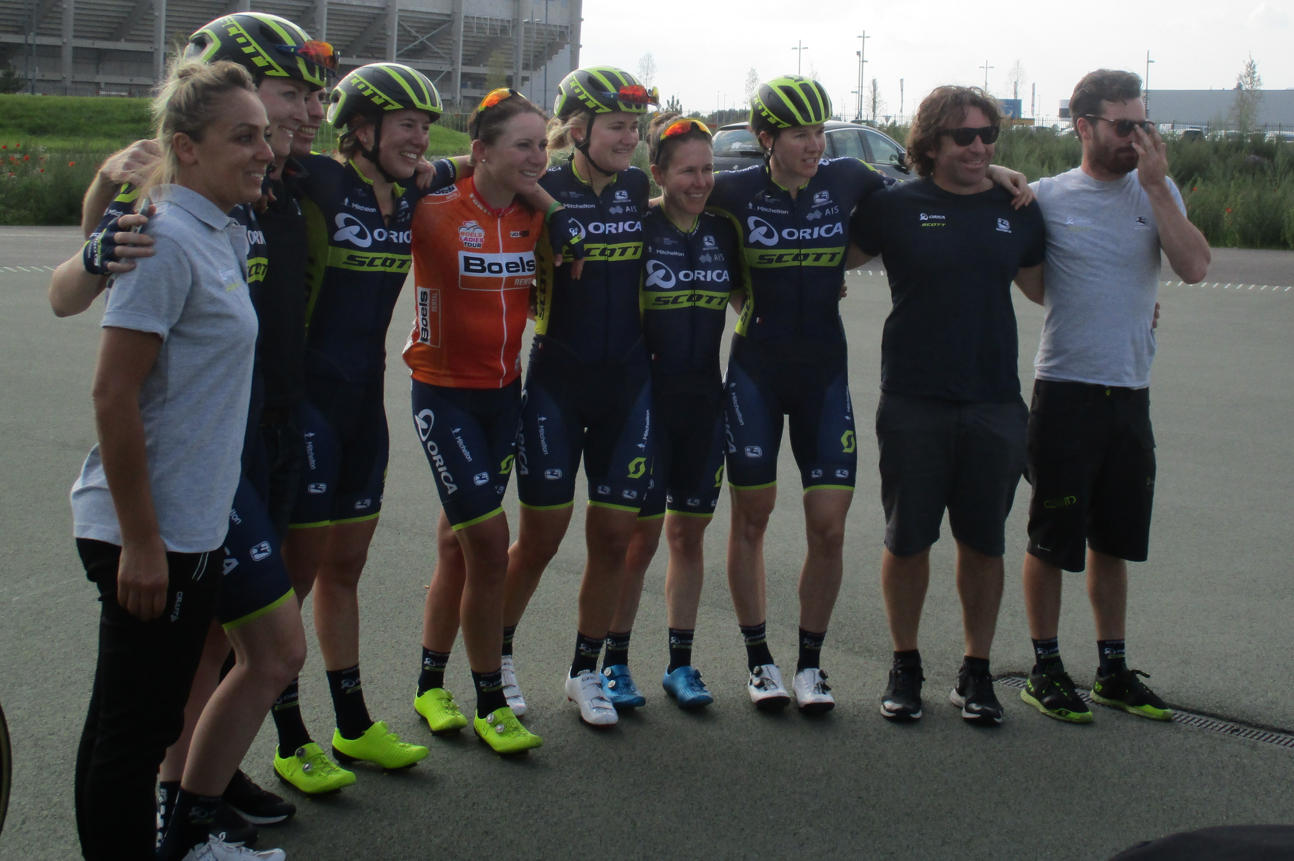 Na de finish van de laatste etappe van de Boels Ladies Tour 2017 op het Tom Dumoulin Bike Park in Sittard-Geleen.